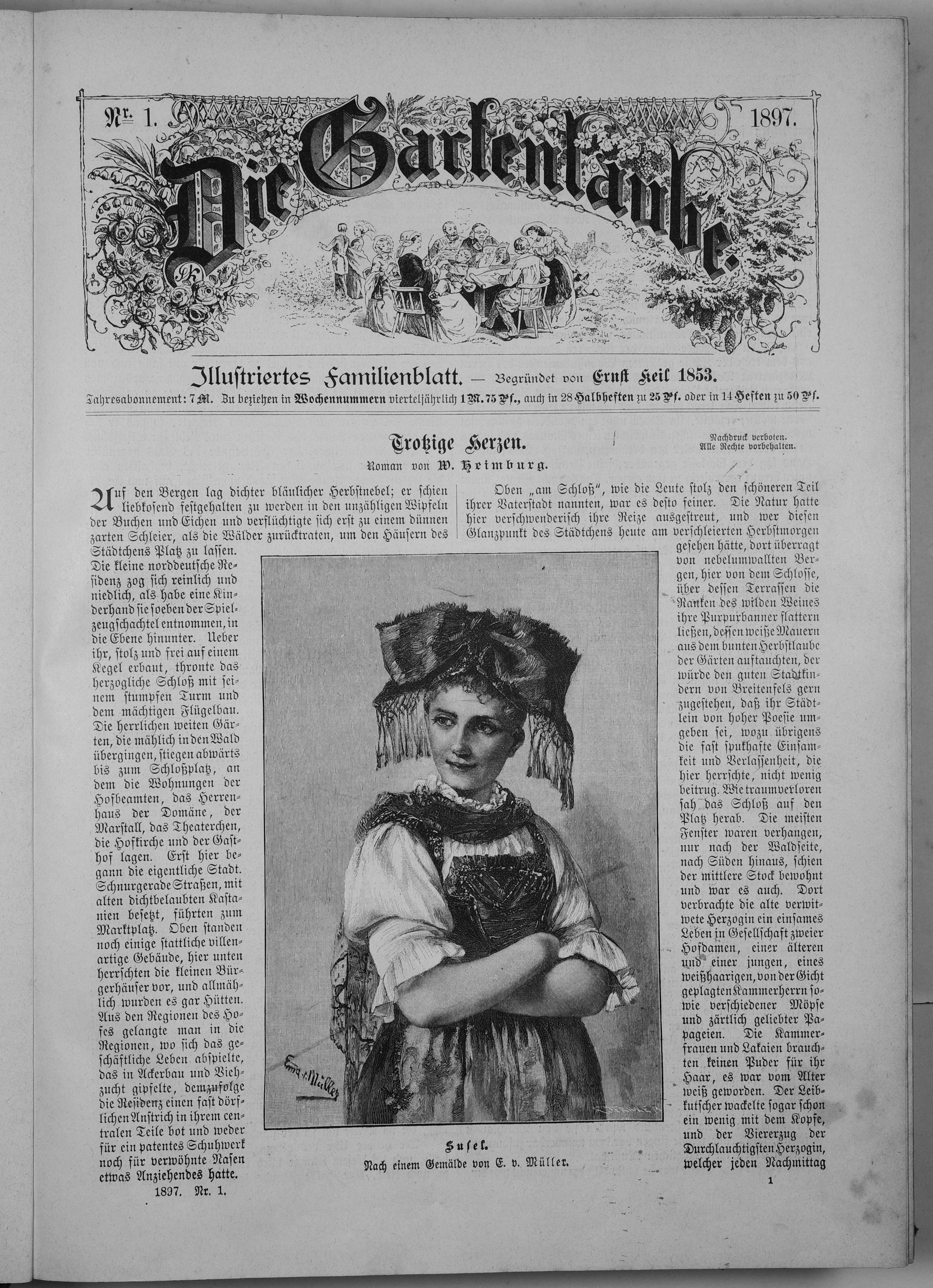 Dieses ist Seite 1 von 894, in dem Buch (page 1 of 894, in journal) "Die Gartenlaube" 1897. Letzte Seite (end page): File:Die_Gartenlaube_(1897)_894.jpg (end 1897). "Trotzige Herzen" (Defiant Hearts), W. Heimburg. Illustrat. "Susel" by E. von Müller. Extracted Illustrat.: File:Die Gartenlaube (1897) 001 Susel.jpg File:Die Gartenlaube (1897) 001 Susel retouch.jpg